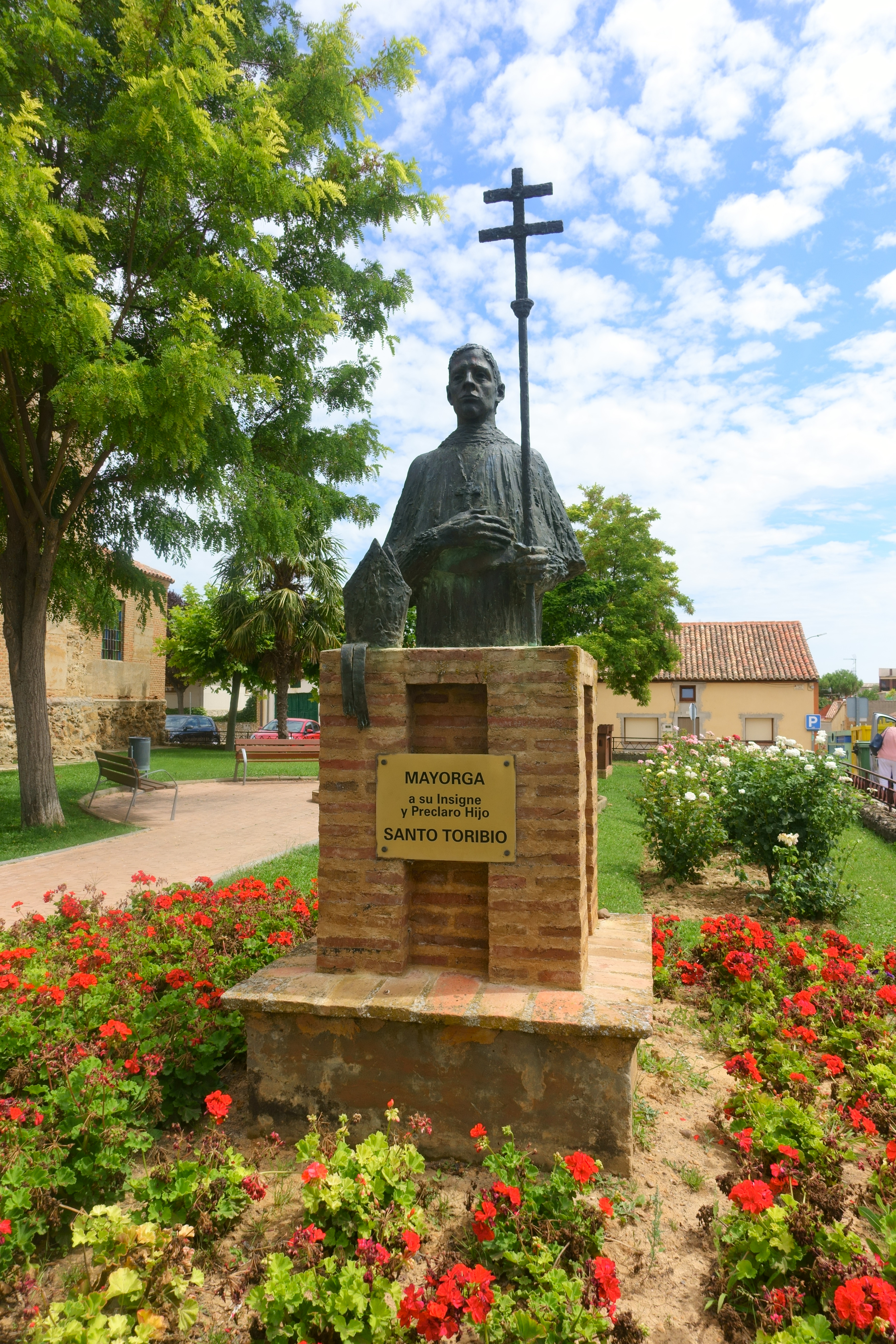 Monumento a Santo Toribio, Mayorga (Valladolid, España).